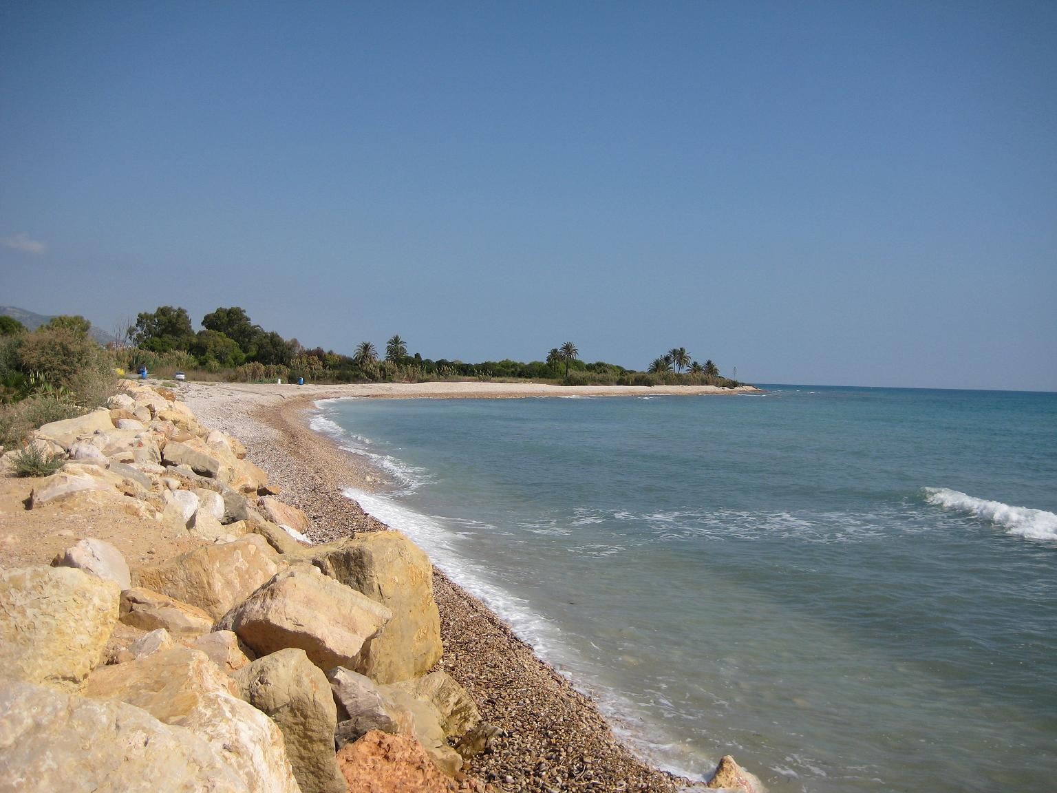 Platja de Capicorb a Capicorb en el municipi d'Alcalà de Xivert